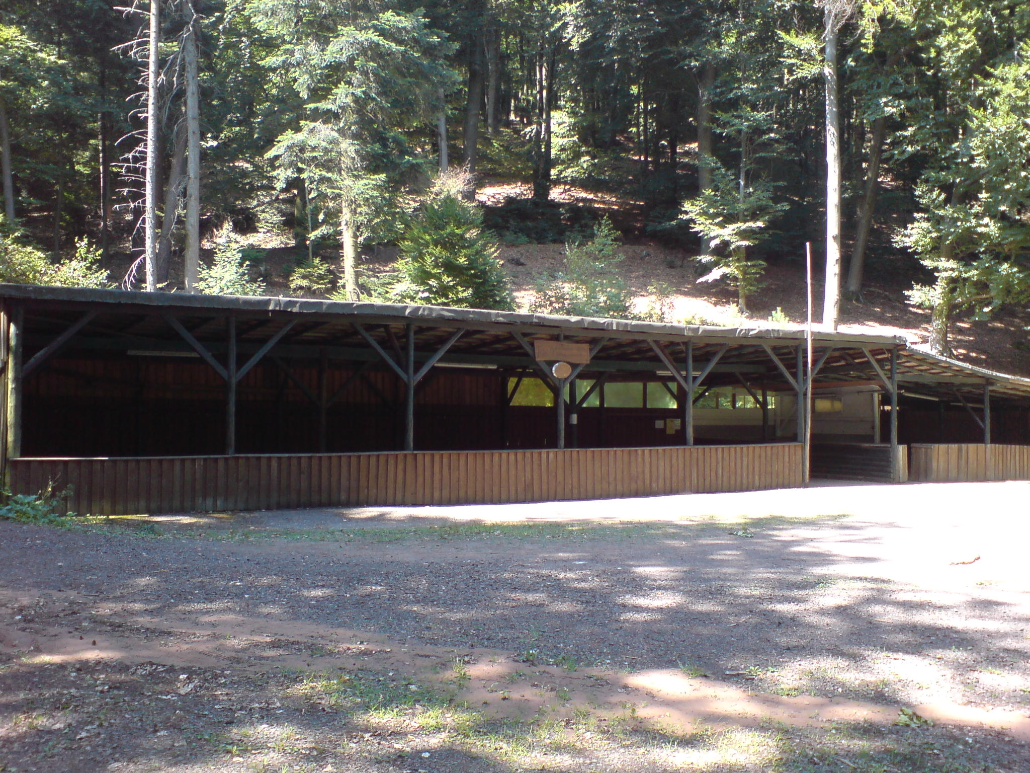 Die Karlsplatzhütte am Karlsplatz bei Klingenmünster.